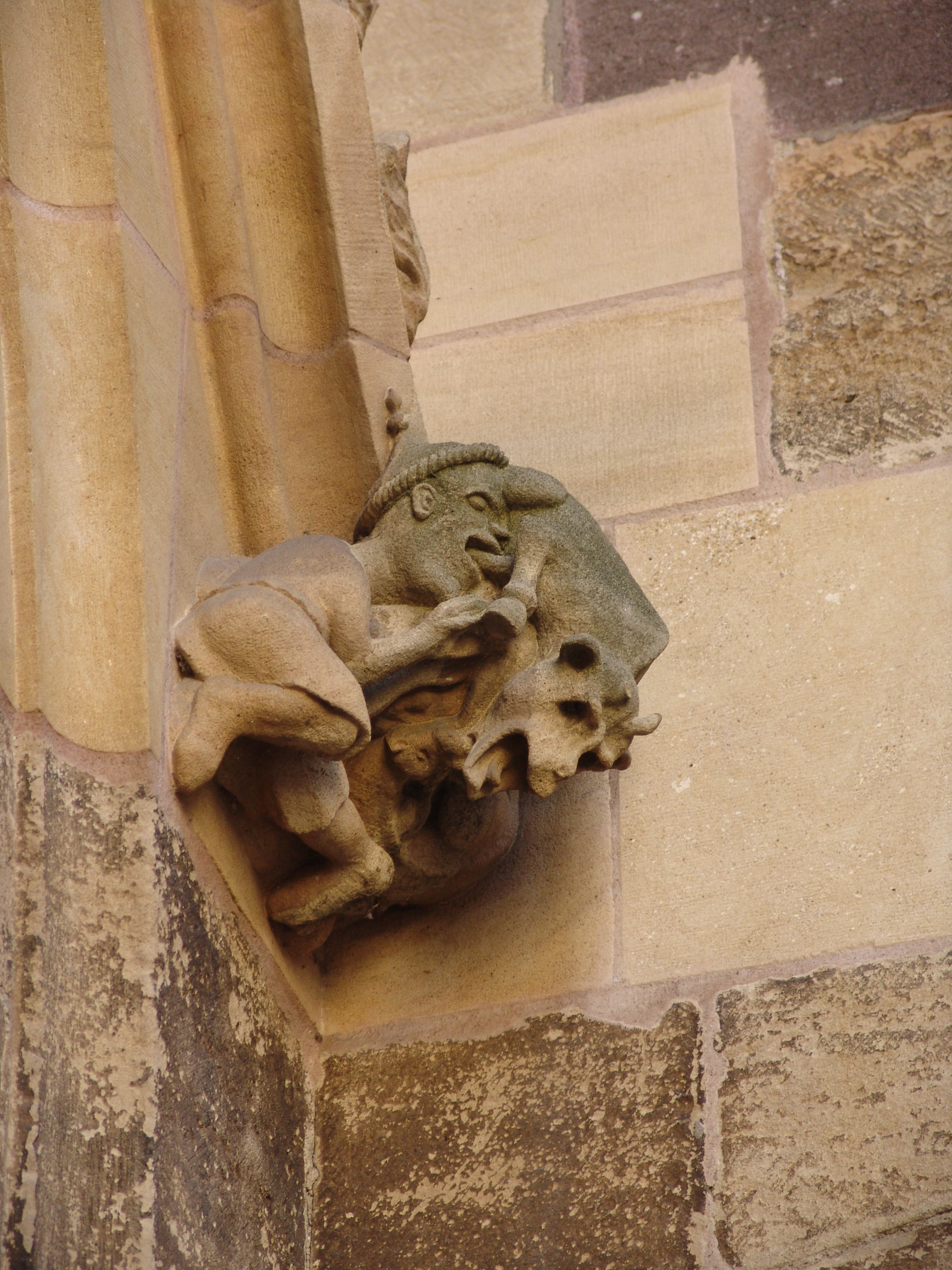 Collégiale Saint-Martinancienne collégiale Judensau : Juif mangeant les excréments d'une truie et ici d'un démon